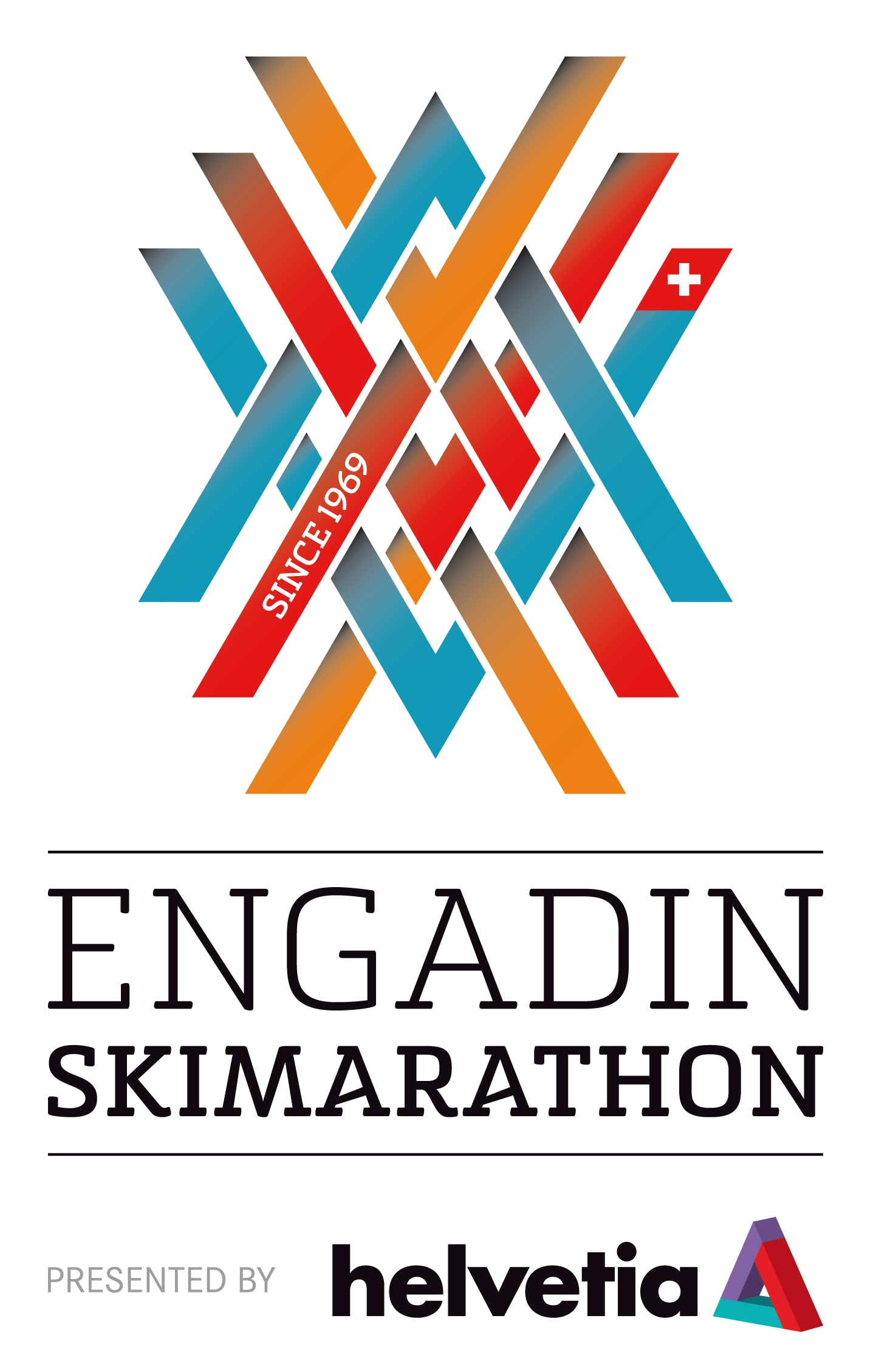 Engadin Skimarathon Logo